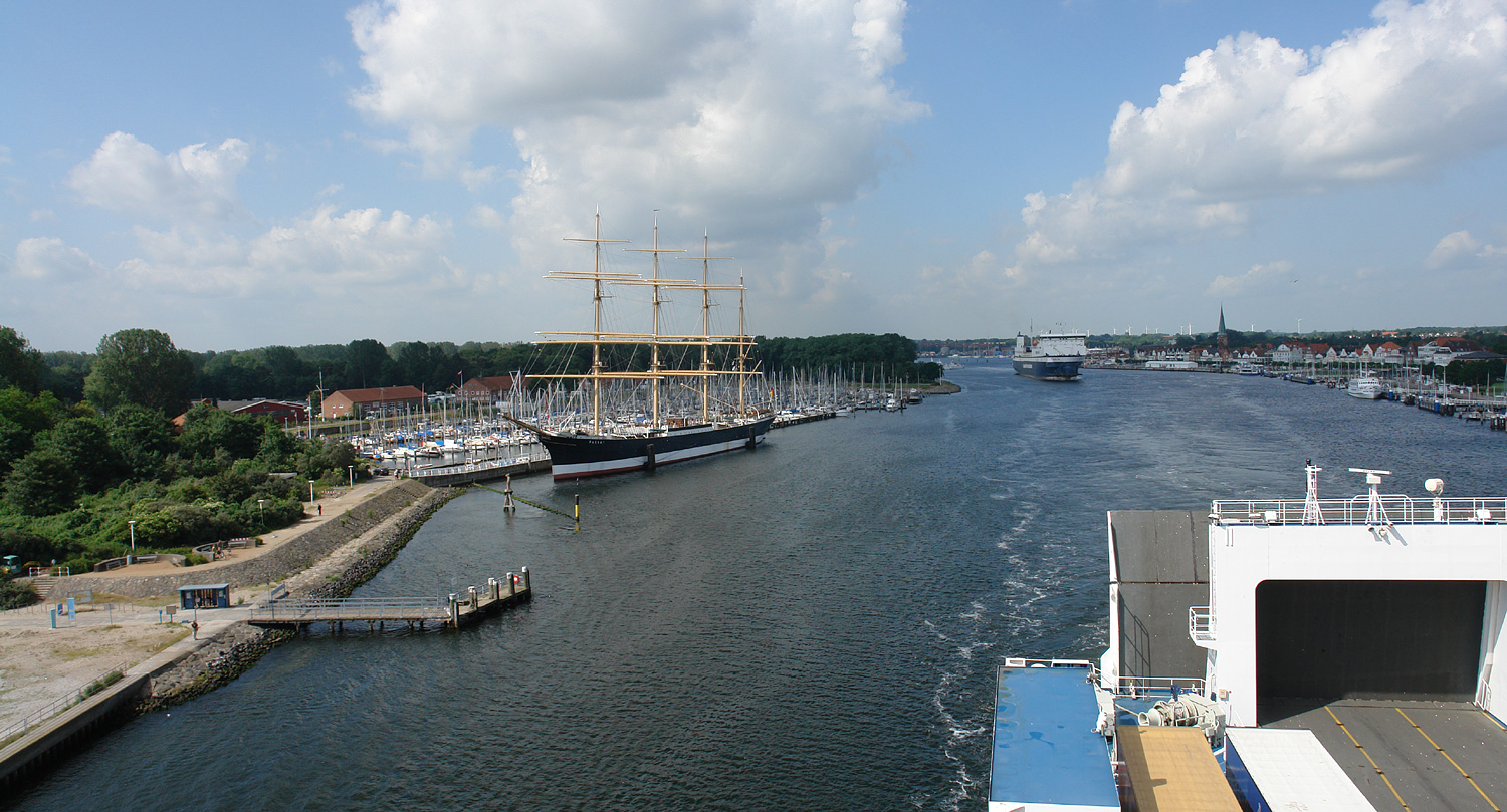 Priwall: Blick auf die Anlegestelle der Priwallfähre (Personenfähre), Segelhafen mit Passat und Altstadt Travemünde